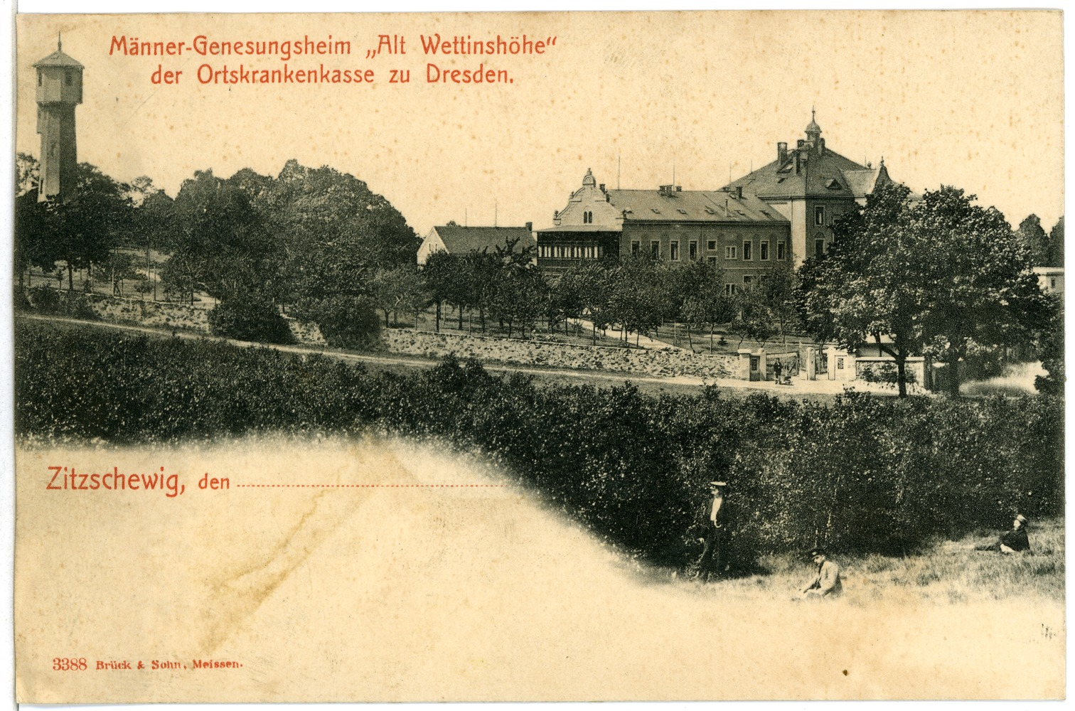 Zitzschewig; Männer-Genesungsheim Alt-Wettinshöhe This postcard is from publisher Brück & Sohn in Meißen ( postcard has a unique number 03388 and is available in a higher resolution at the publisher. This images was uploaded in a cooperation project between Wikipedians and the publisher.